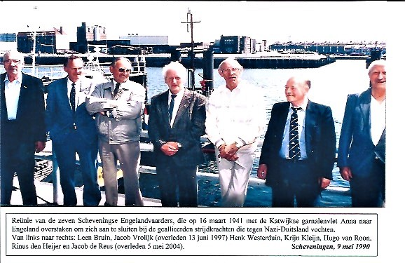 Reünie van de zeven Scheveningse Engelandvaarders in 1990. Vlnr.: Leen Bruin, Jacob Vrolijk, Henk Westerduin, Krijn Kleijn, Hugo van Roon, Rinus den Heijer en Jacob de Reus.